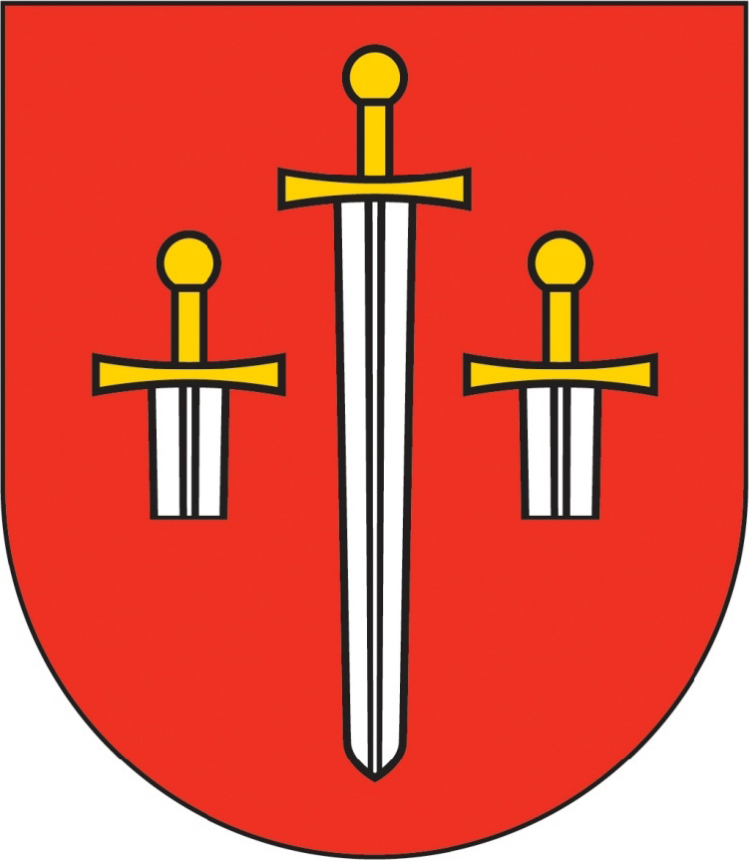 Herb gminy Olszewo-Borki